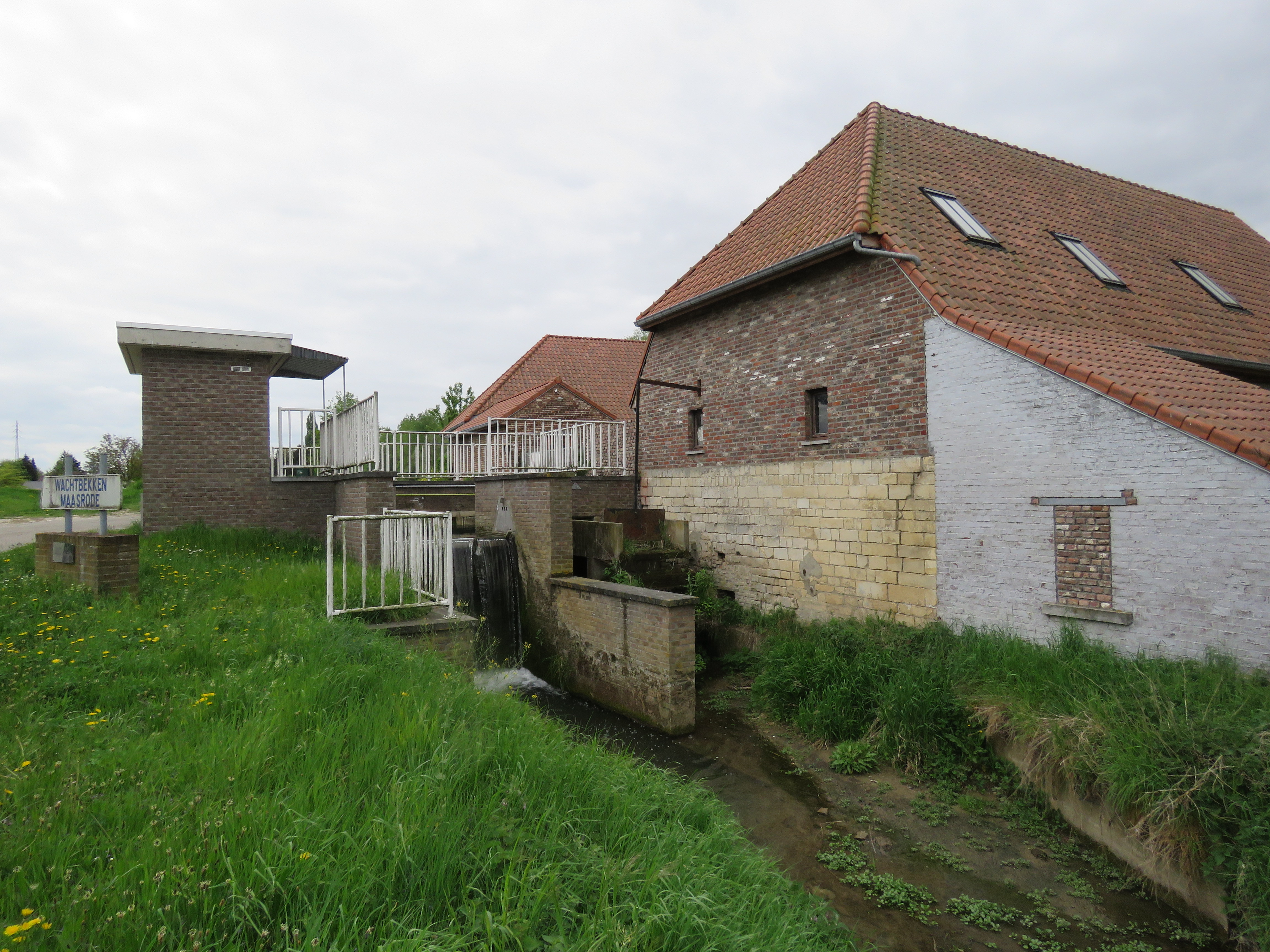 Voormalige watermolen van Halmaal, ook Maasrodemolen genoemd nabij het Wachtbekken Maasrode in Halmaal Sint-Truiden